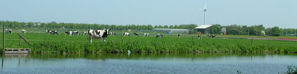 Het polderzicht van Veldhuis, met koeien en tulpen. View of the open fields of Veldhuis, withy cows and tulips